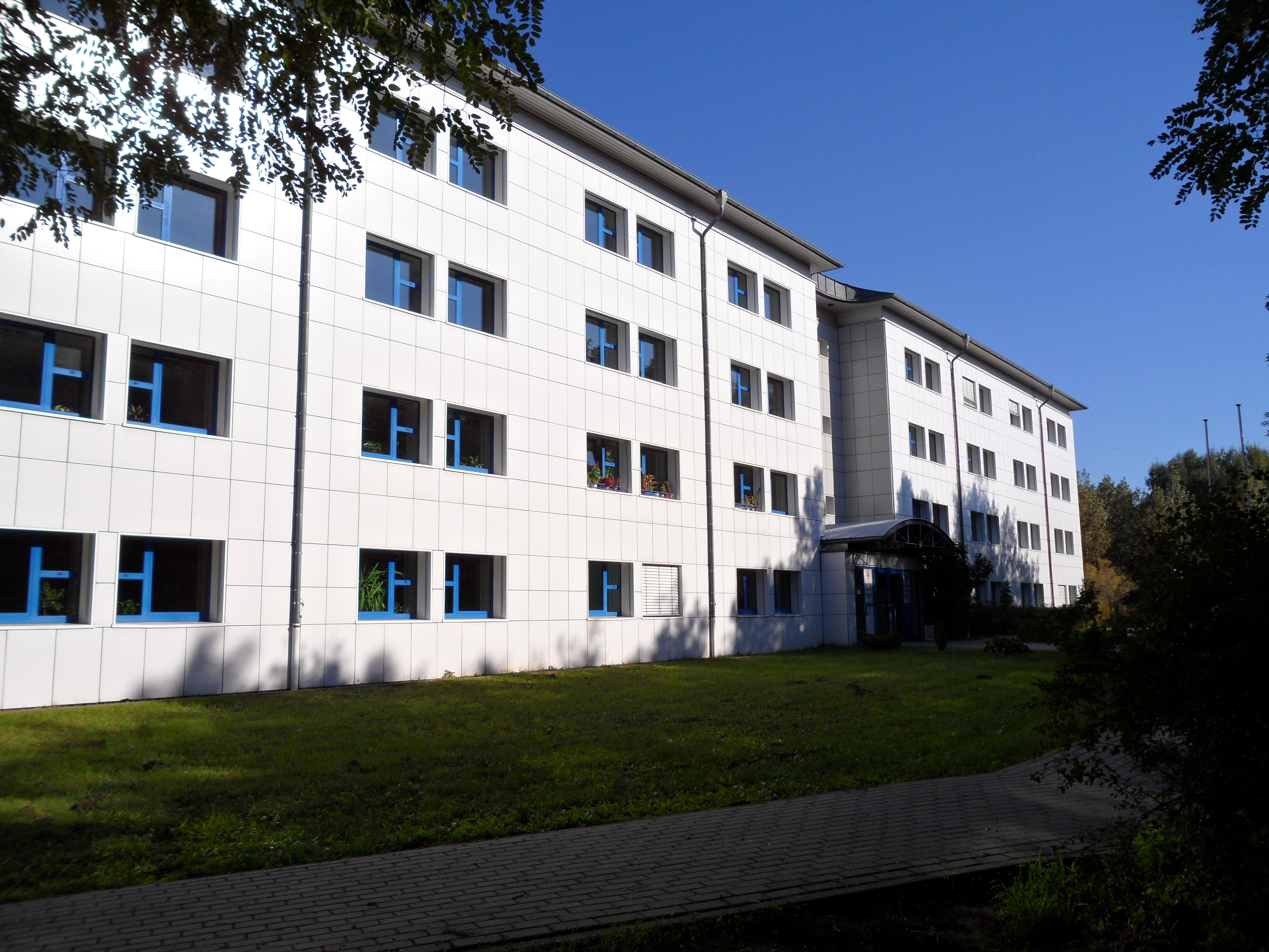 Arbeits- und Sozialgericht Frankfurt (Oder)